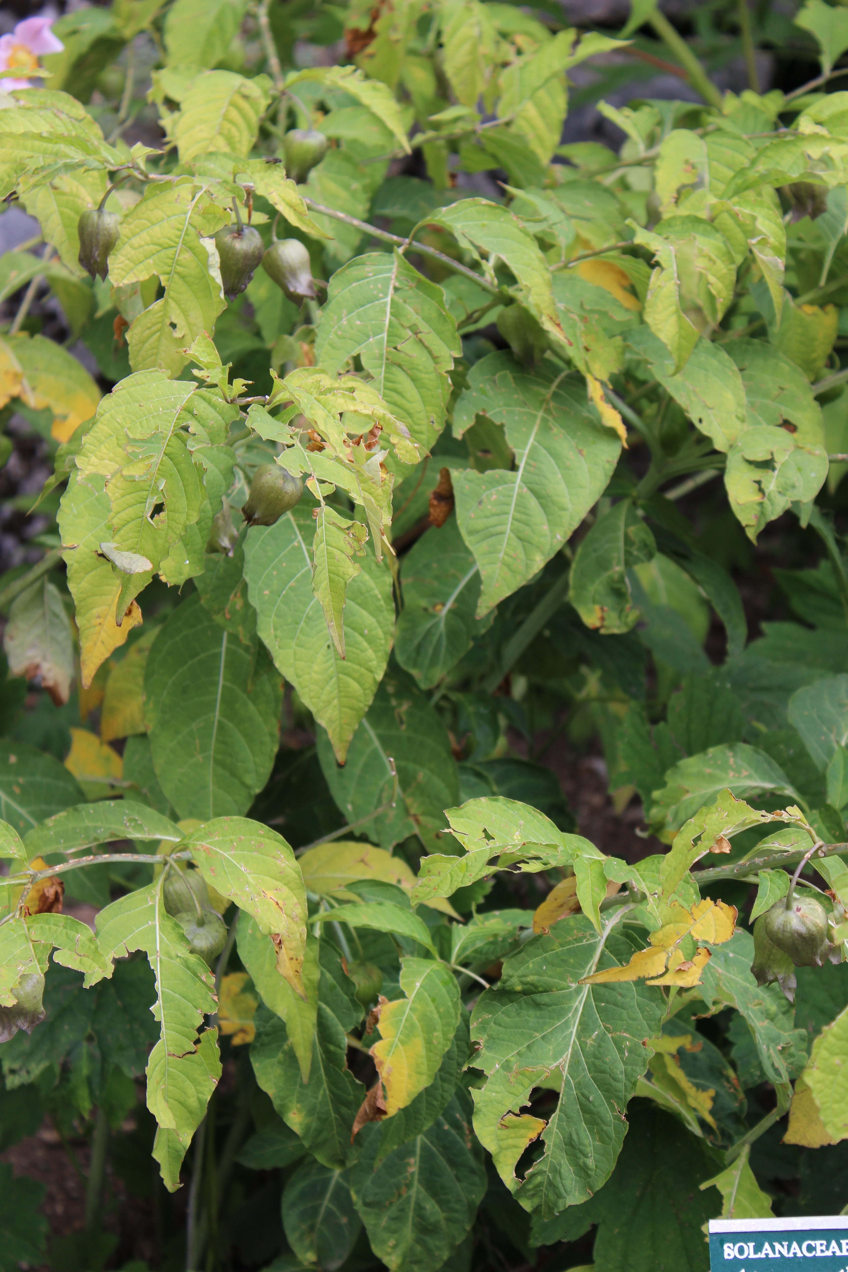 Atropanthe sinensis im Botanischen Alpengarten Viote